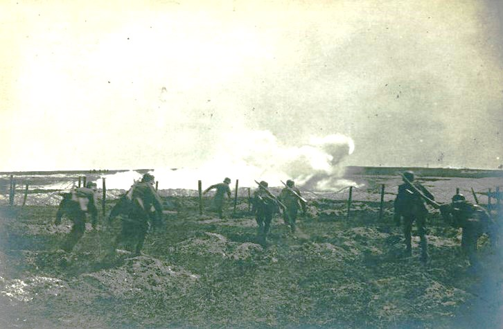 Снимка от атака под димна завеса на австро-унгарска войскова част срещу руснаците в Източна Галиция, Украйна през Първата световна война.